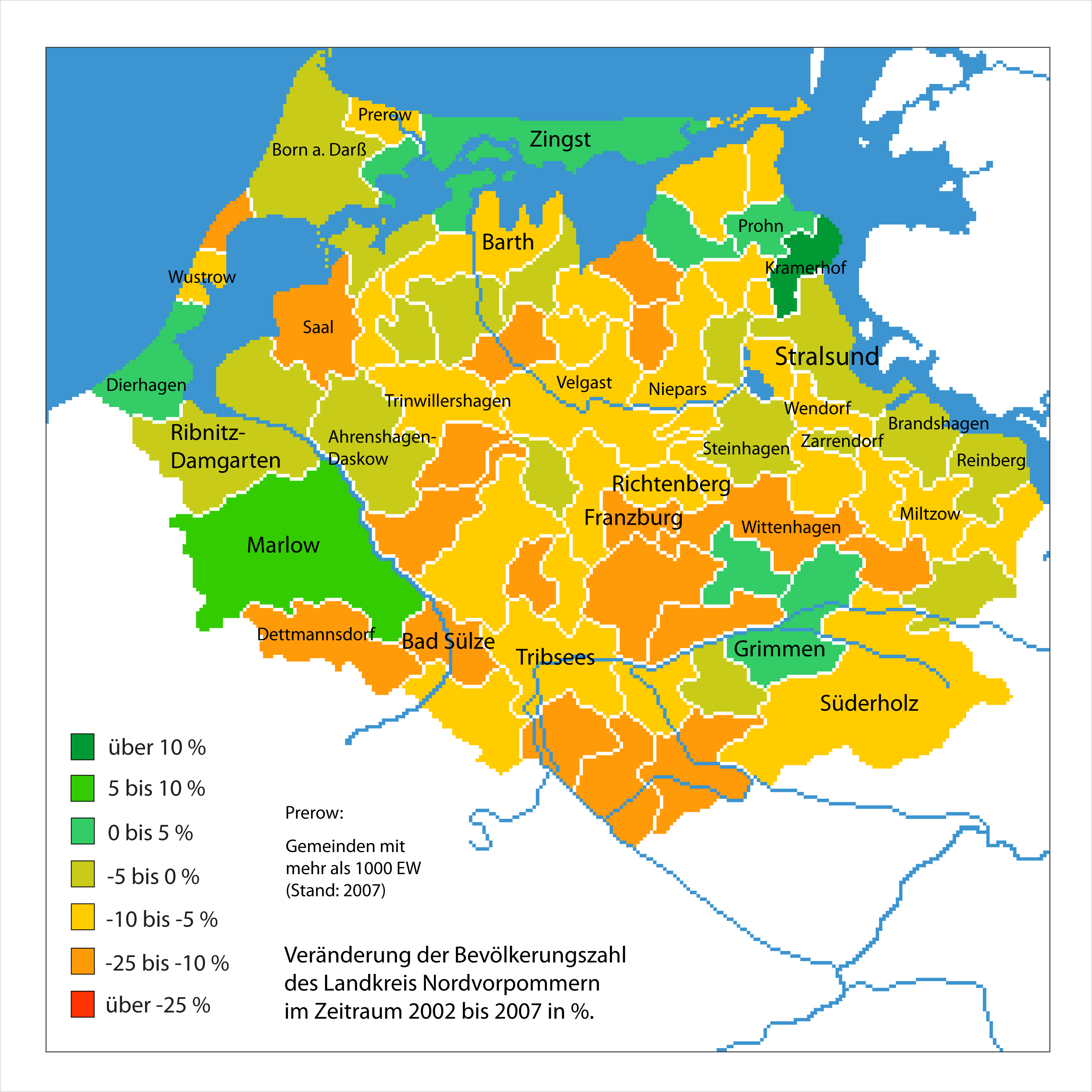 Bevölkerungsgewinn-_bzw._verlust_2002_bis_2007_NVP